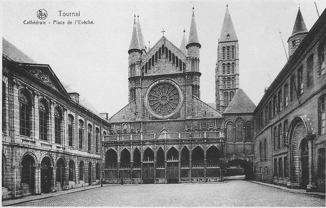 Briefkaart van de kathedraal en de Bischdomplaats in Doornik